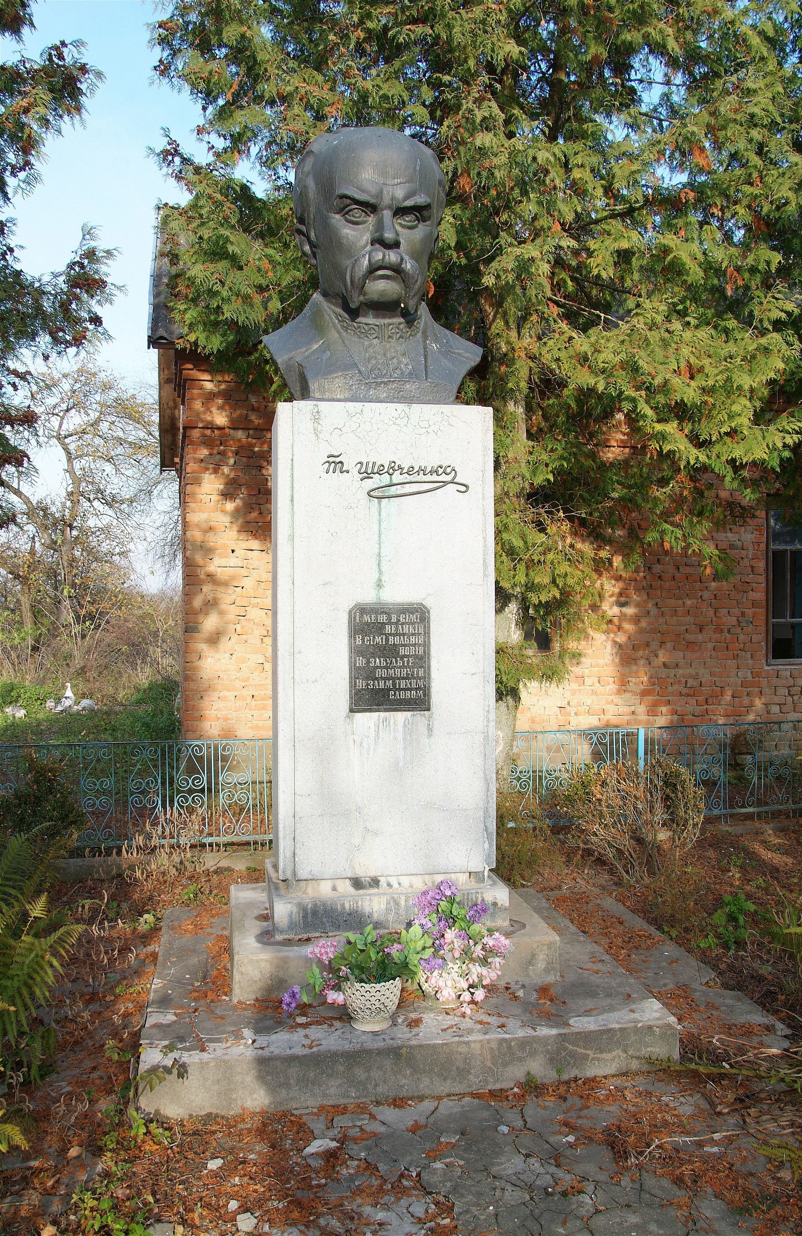 Пам'ятник поету, письменнику, художнику Шевченку Тарасу Григоровичу, село Городище, біля церкви